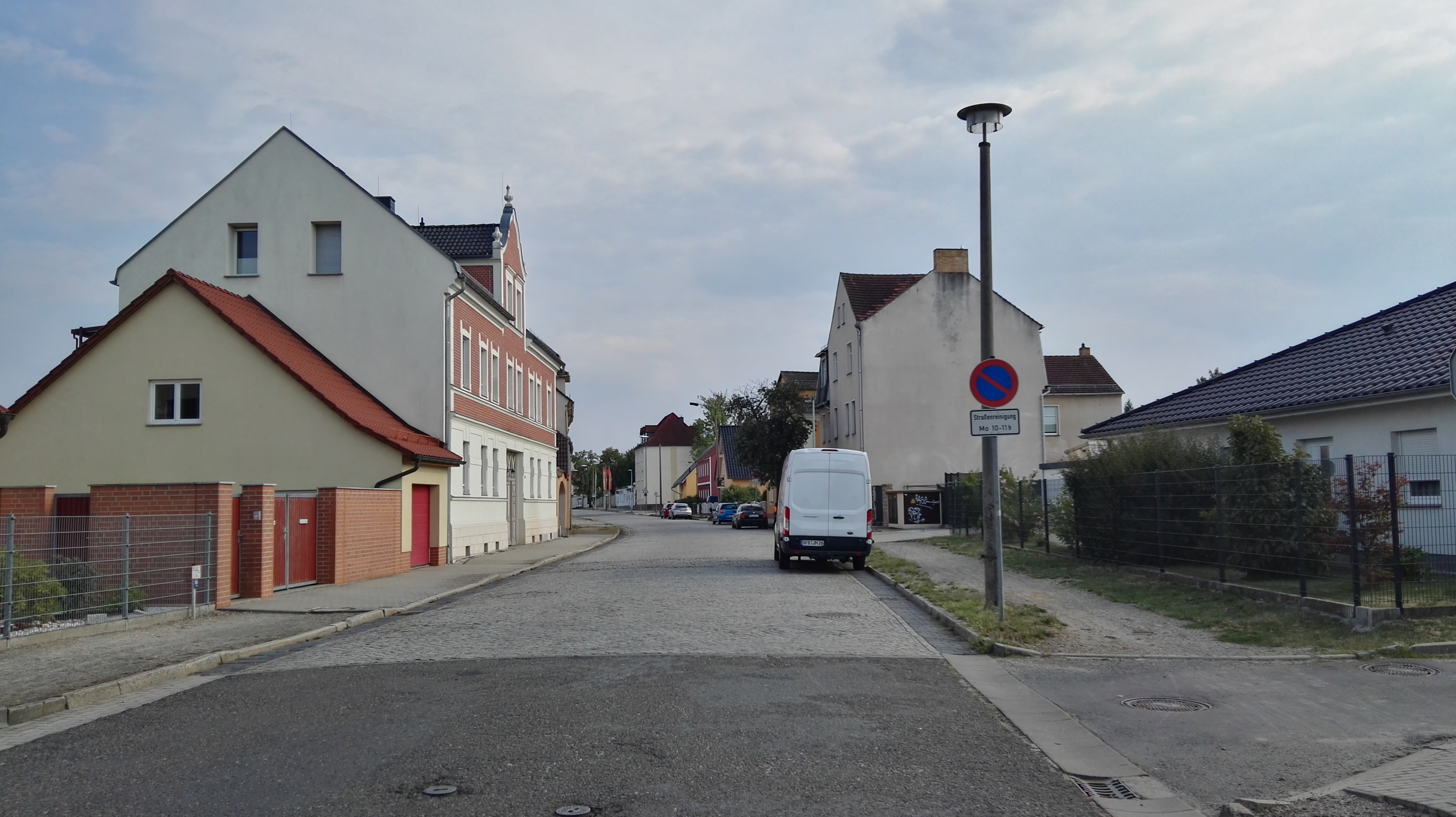 August-Bebel-Straße in Senftenberg; Blickrichtung Süden ab Radojewskistraße zur Ernst-Thälmann-Straße